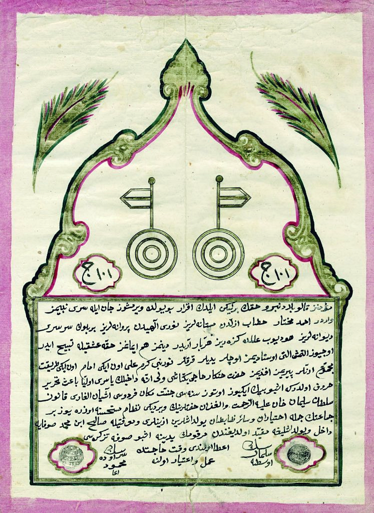 Mehmedoğlu Salih'in, ocağın 101. cemaatine katıldığını gösteren tezkire 1822-1826 arasında düzenlenmiş ve türünün son örneklerinden biri.